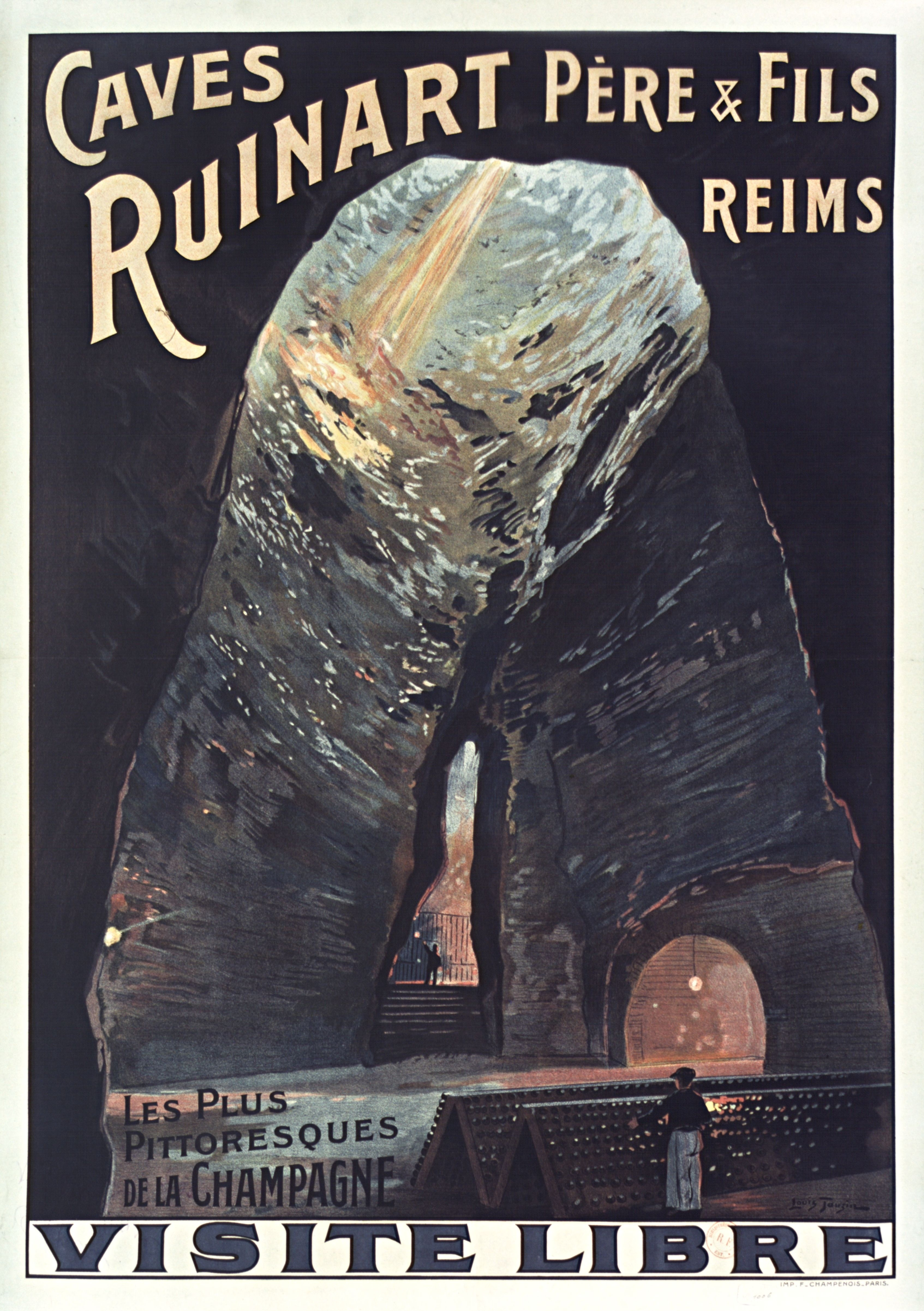 Caves Ruinart Père & fils, Reims, les plus pittoresques de la Champagne. Visite libre : affiche .